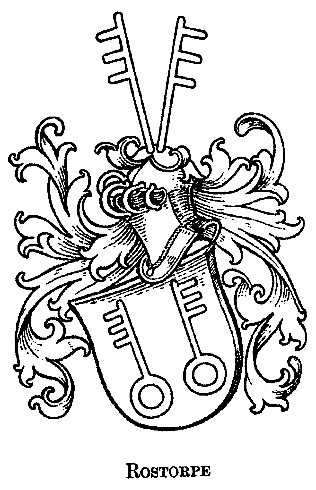 Wappen der Herren von Rostorpe